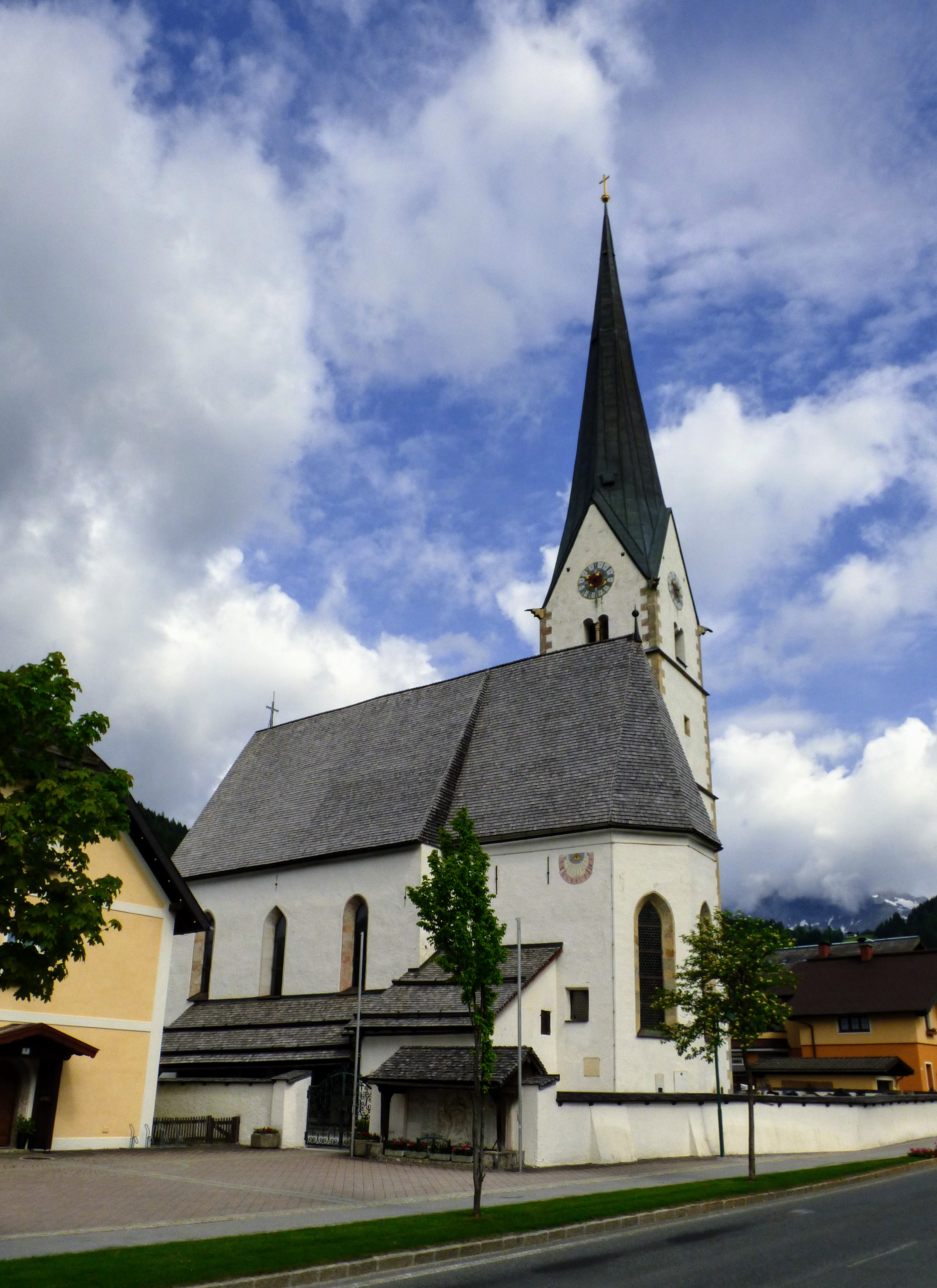 Pfarrkirche St. Martin im Tennengebirge